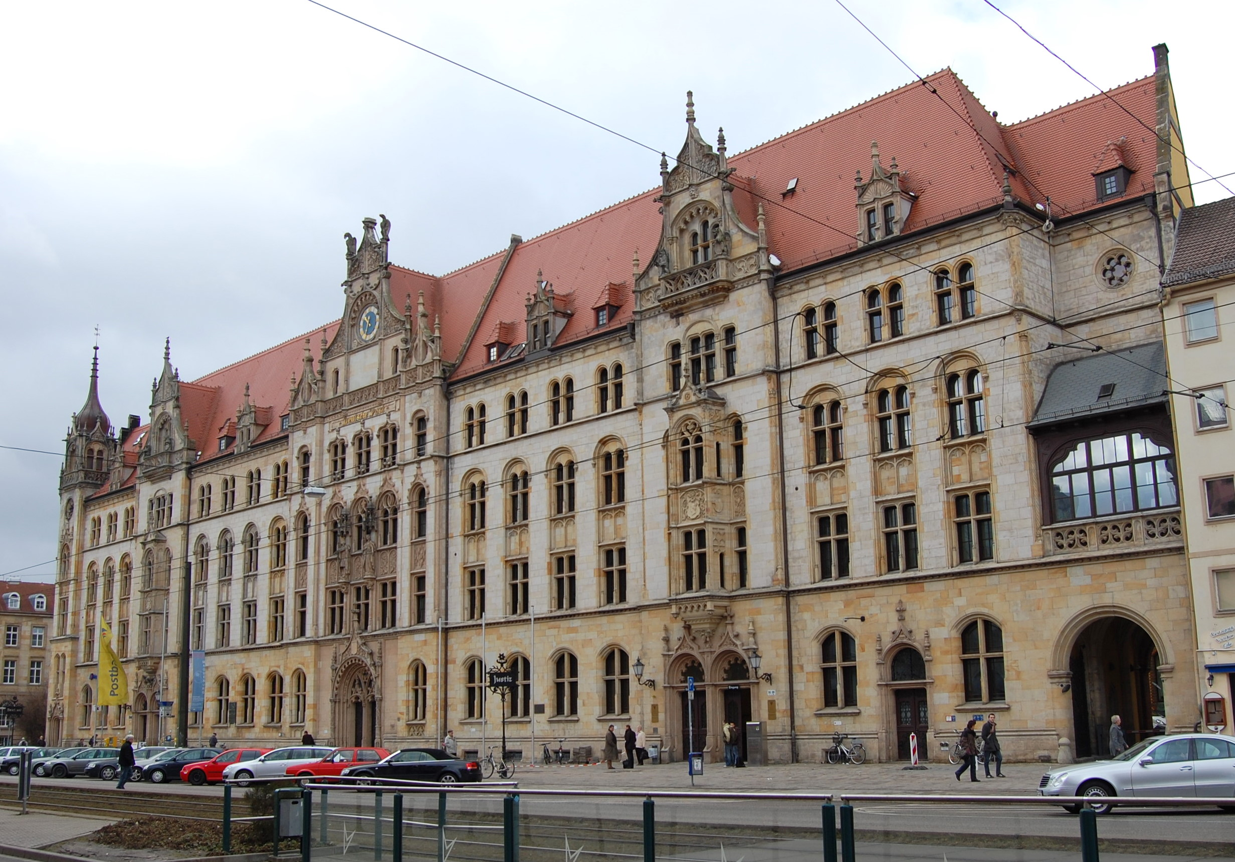 Justizzentrum Eike von Repkow in Magdeburg